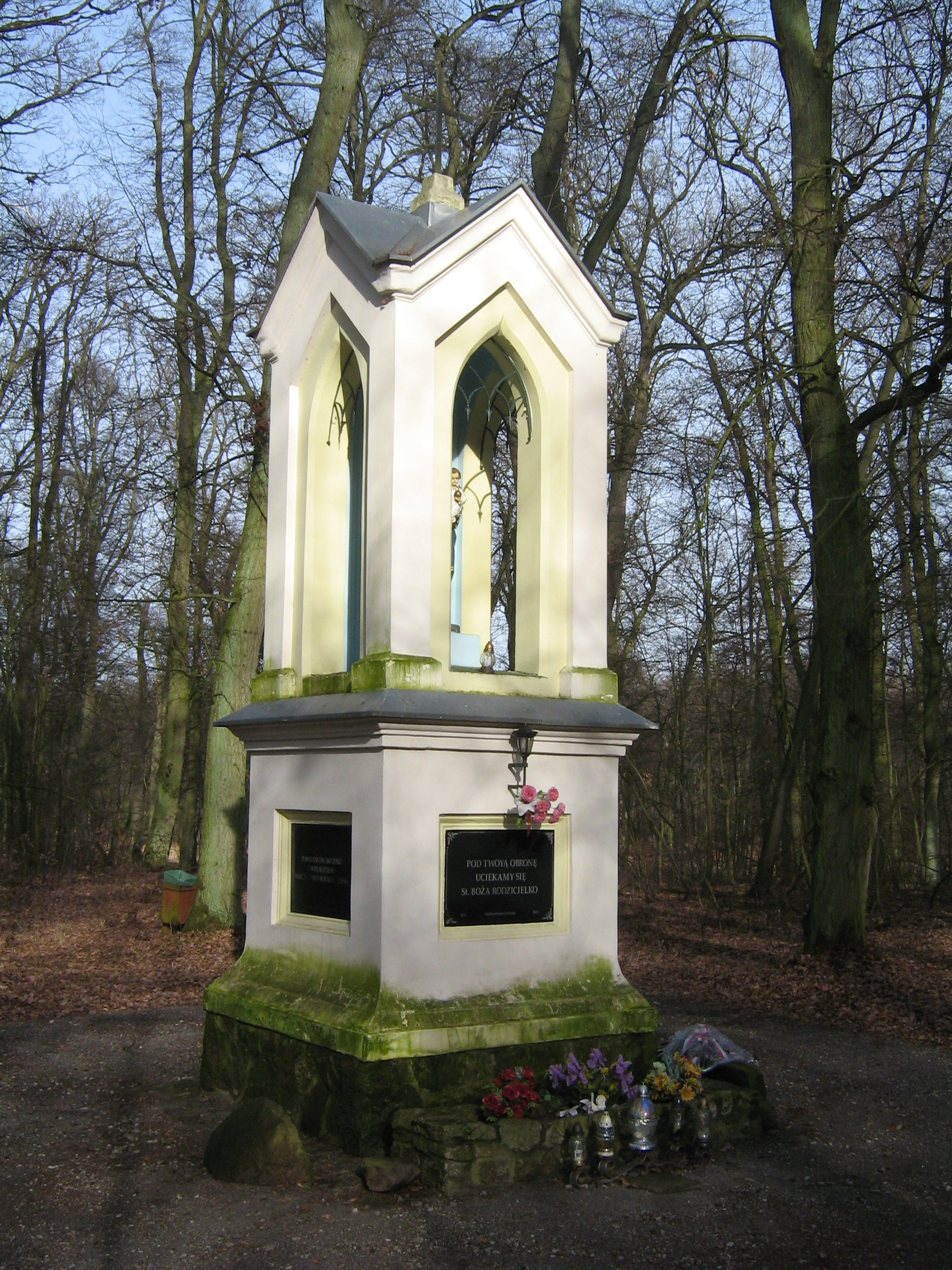 Kapliczka leśna w Ujeździe, gmina Kamieniec, Wielkopolska